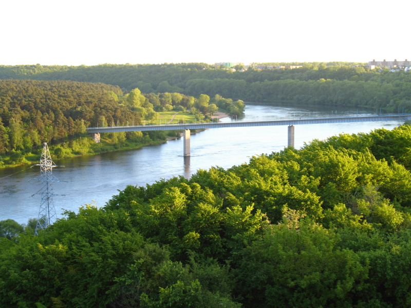 Trijų mergelių tiltas, Kaunas.